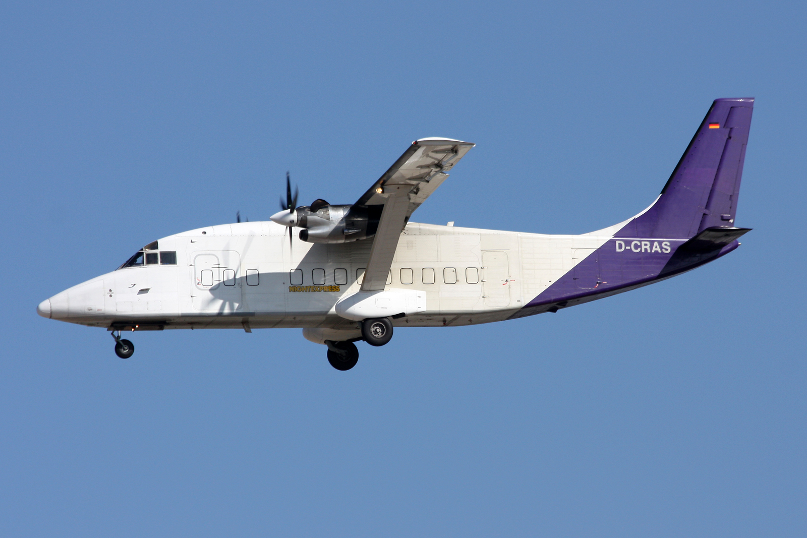 Frankfurt am Main (Rhein-Main AB) (FRA / EDDF / FRF) 4.2011